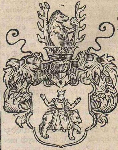 Rawa wg. B. Paprockiego